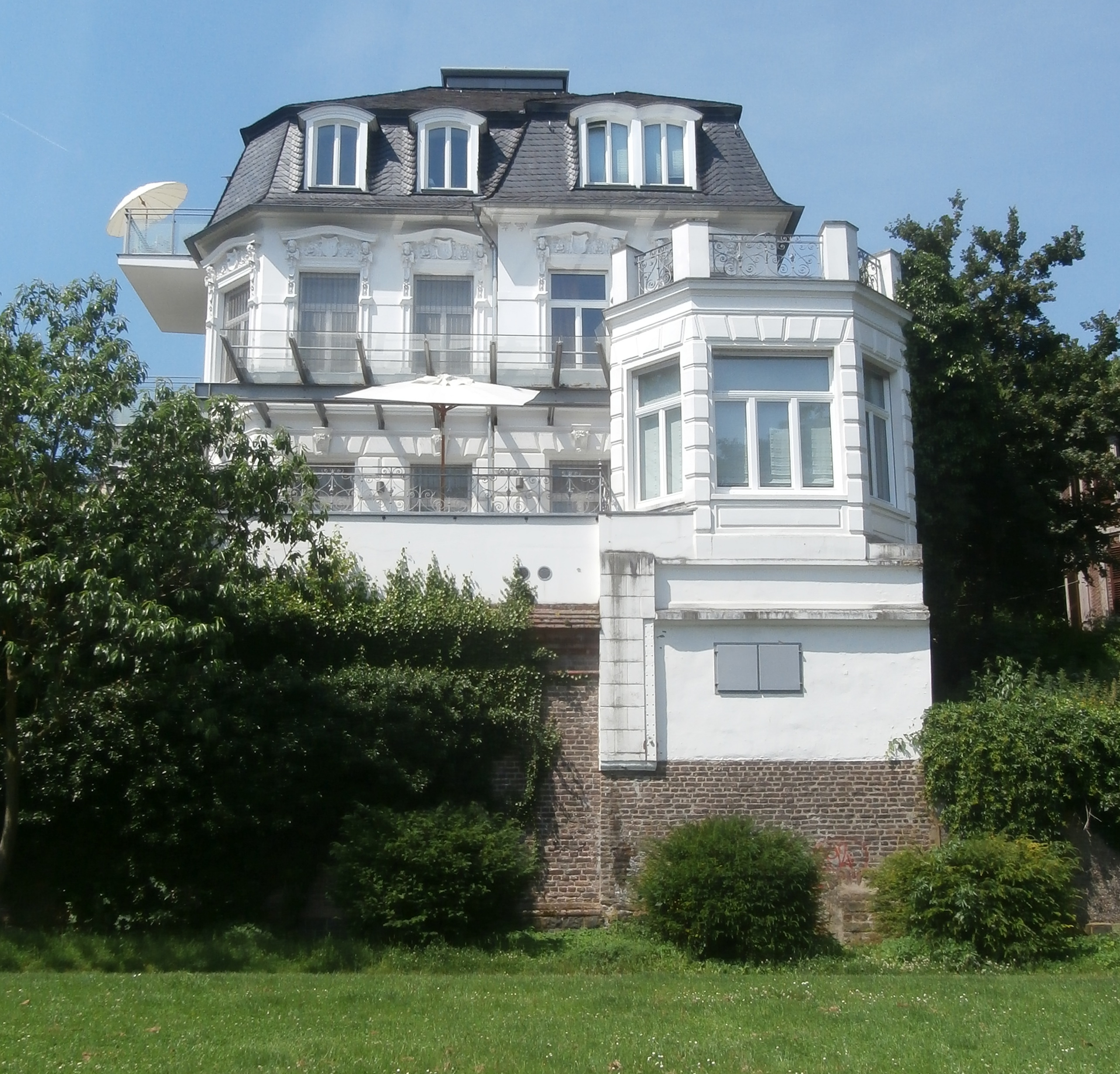 Villa Hoeller, Am Schänzchen 12, Bonn-Castell: Rheinseite, Ansicht vom Leinpfad